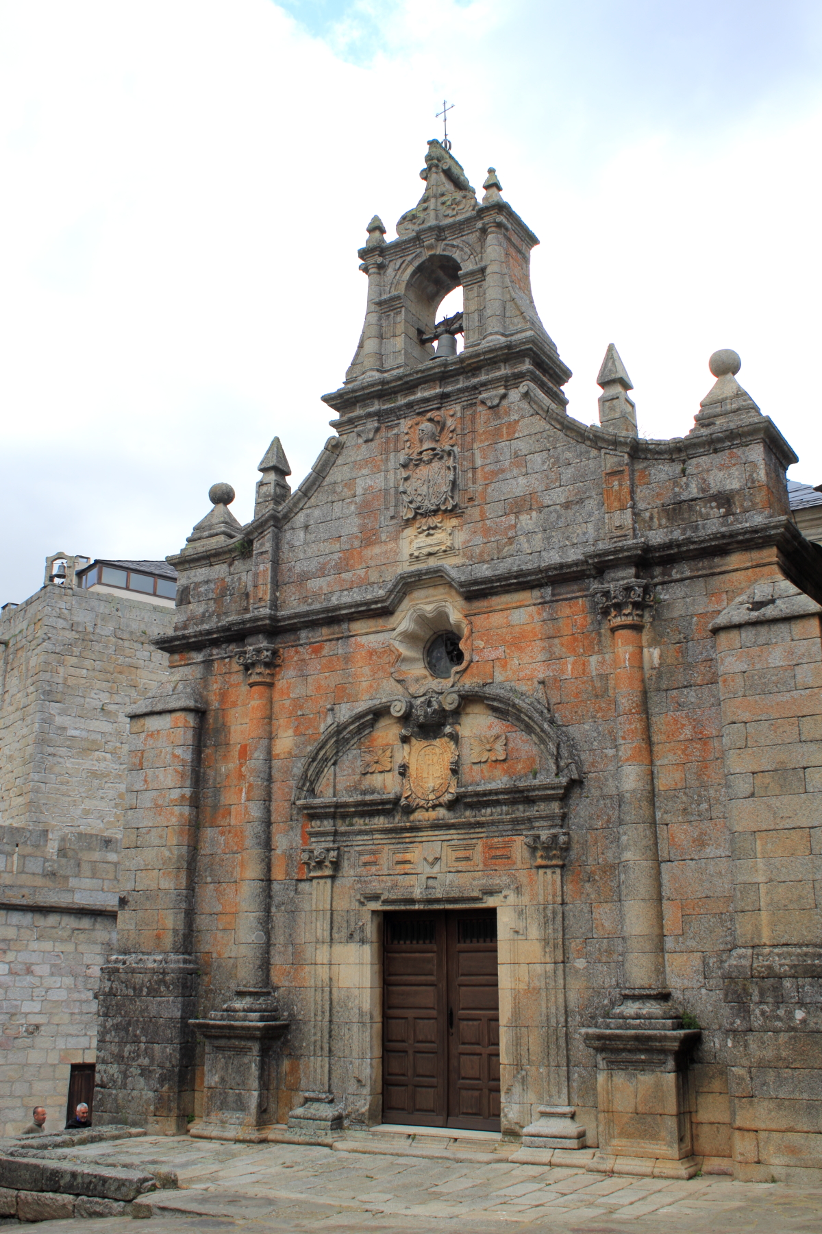 Ermita de San Cayetano en Puebla de Sanabria (Zamora, España).